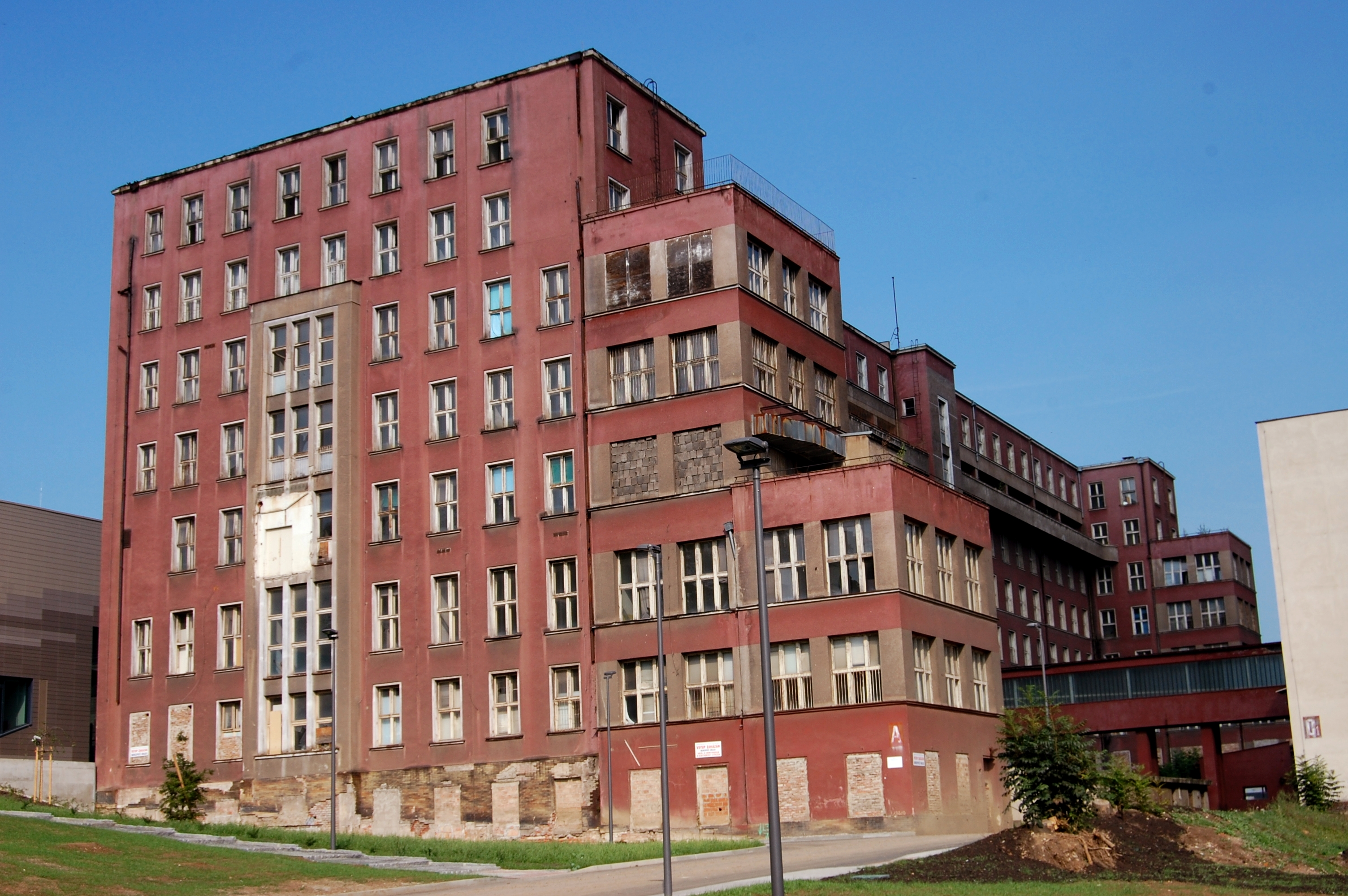 Pavilon "A" bývalé Masarykovy nemocnice v Ústí nad Labem, který je dnes součástí kampusu Univerzity J. E. Purkyně.